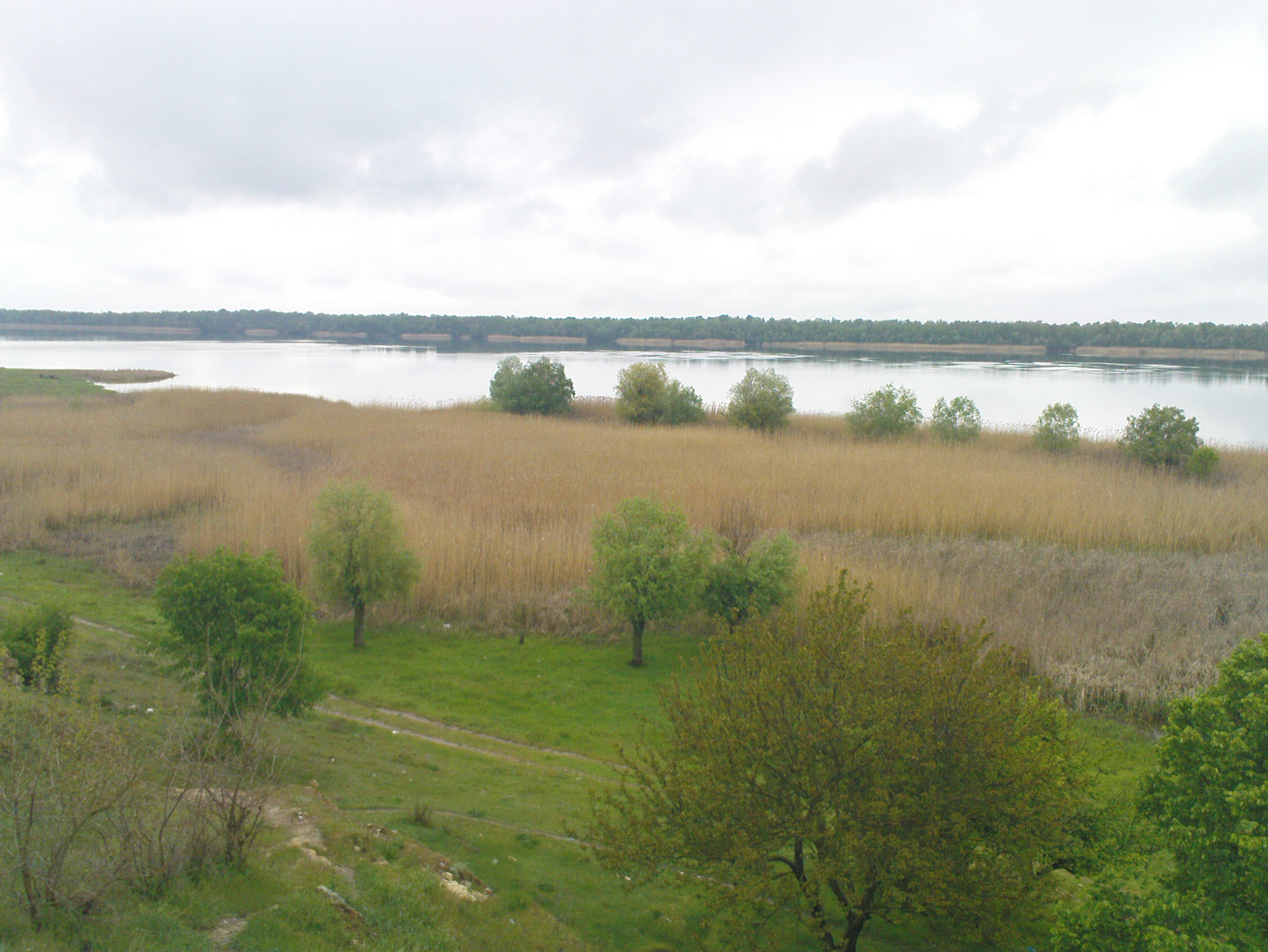 Прибрежный комыш